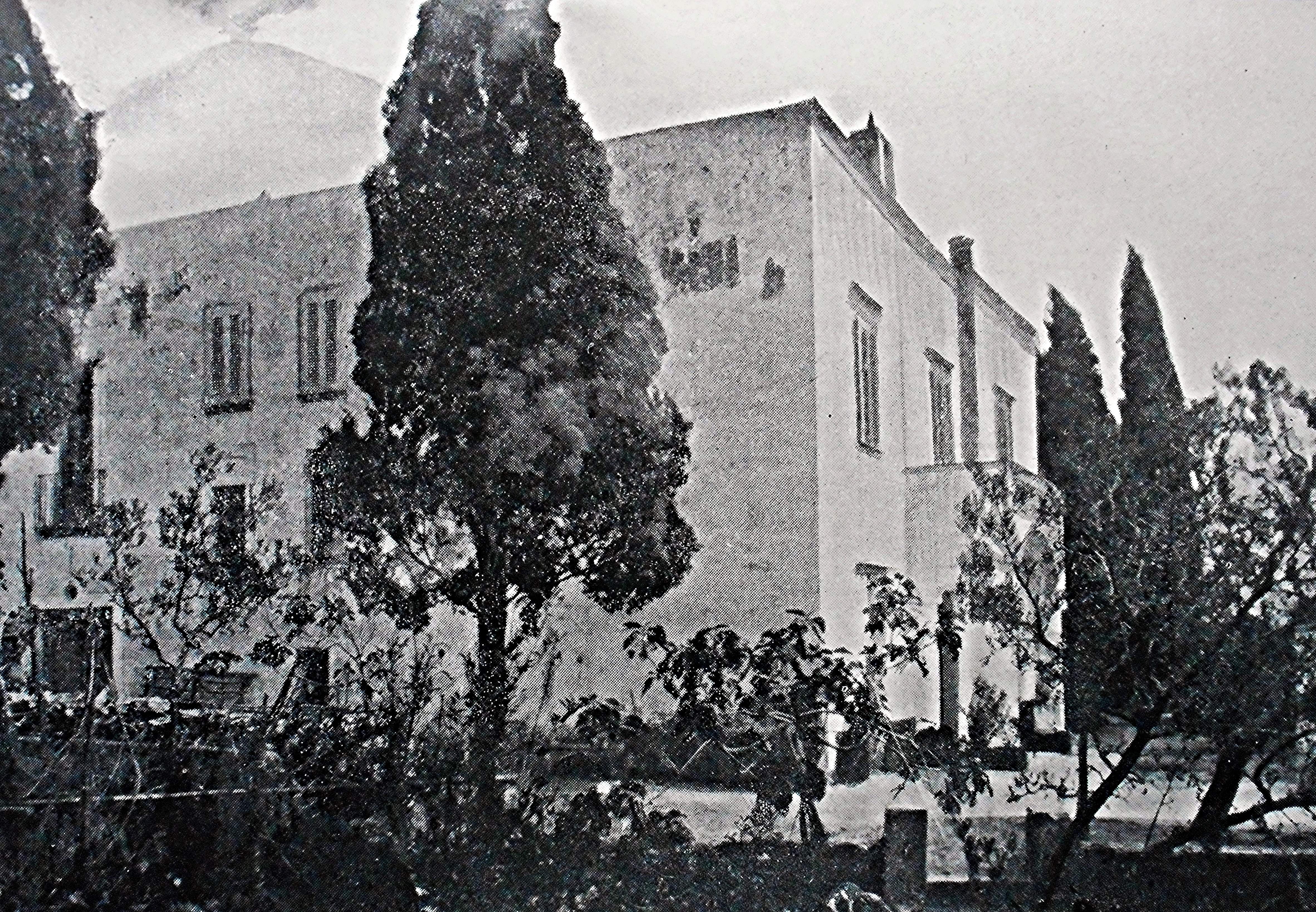 "Villa delle Ginestre" a Torre del Greco in una foto pubblicata nei "Pensieri di varia filosofia" (poi "Zibaldone") di Giacomo Leopardi, volume VI, 2a edizione, 1906, Firenze, Le Monnier. È la villa che conobbe Leopardi quando vi soggiornò tra il 1835 e il '37, ospite della famiglia Ferrigni. Si vede il piccolo protiro sull'ingresso, sostituito poi in una malaugurata rifazione da un terrazzo che gira tutt'intorno. In tale occasione le finestre (ad eccezione di quella della camera di Leopardi) furono aperte in balconi per accedere al terrazzo. Ancora floridi i cipressi fatti piantare dal Ferrigni e quindi già esistenti al tempo del poeta recanatese.